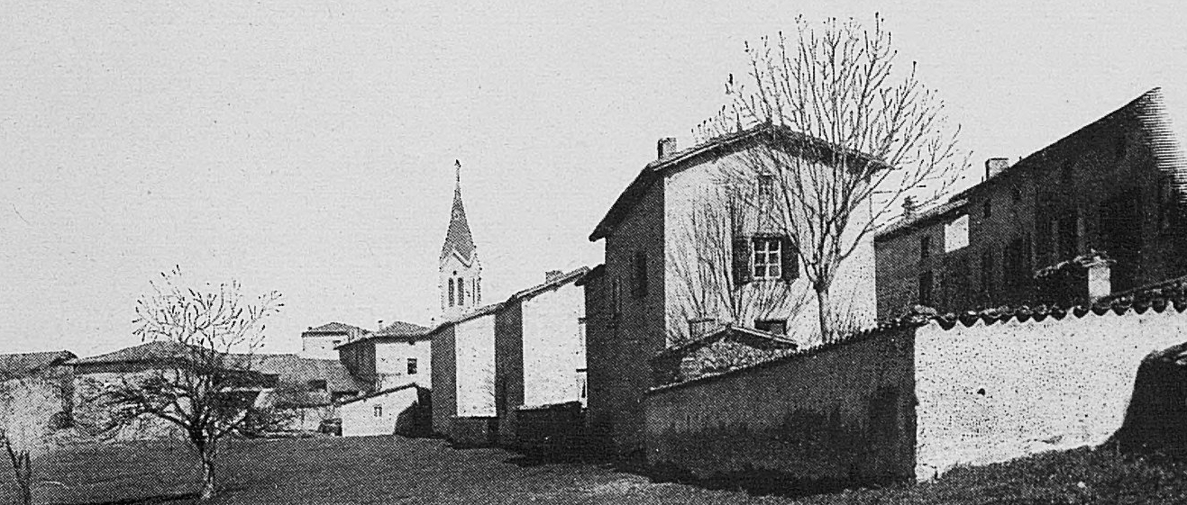 Dictionnaire illustré des communes du département du Rhône. Tome 1 / par MM. E. de Rolland et D. Clouzet.